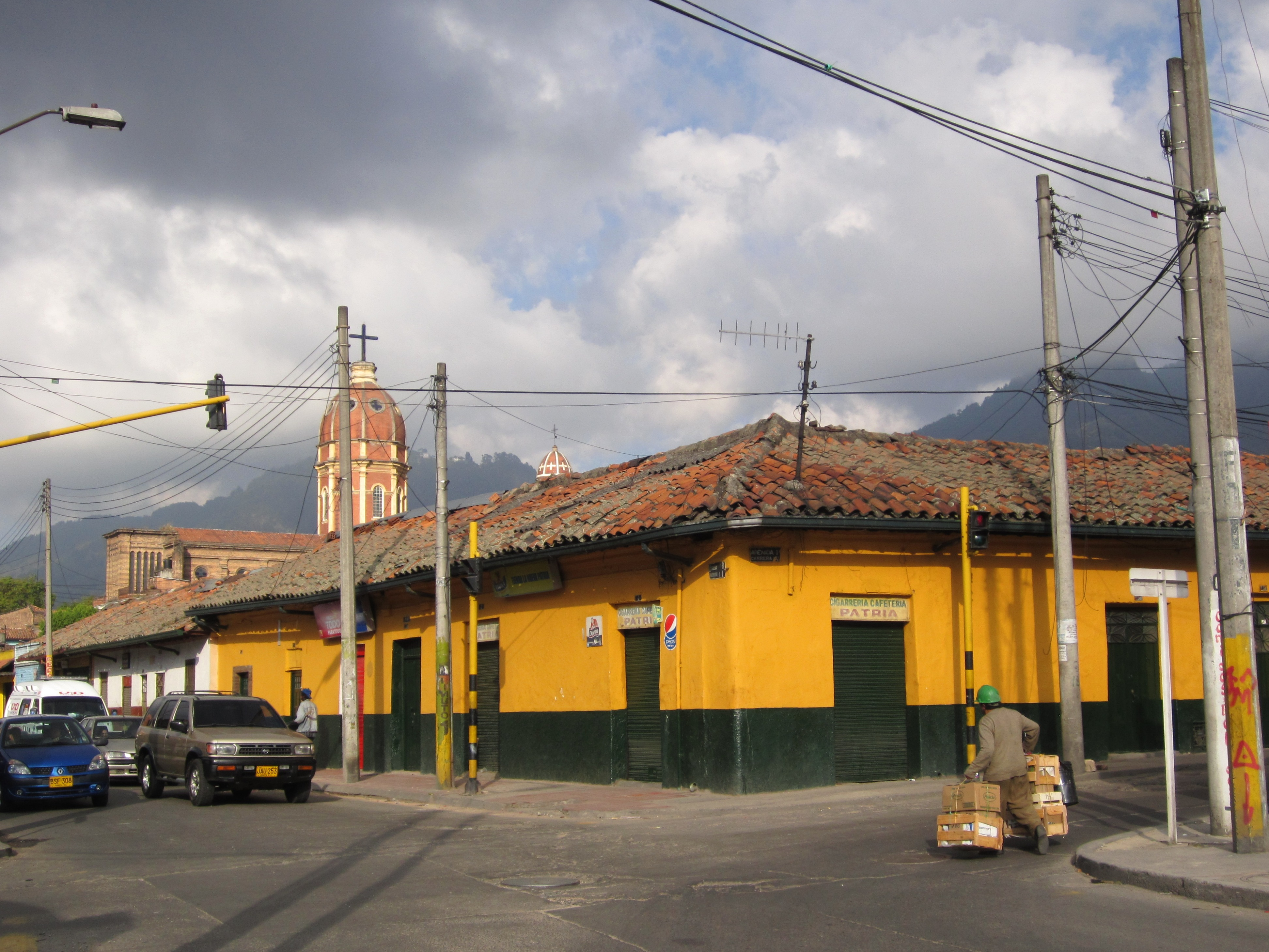 Casa en Bogotá, barrio Las Cruces, carrera 8 con calle 1 F, localidad de Santa Fe.